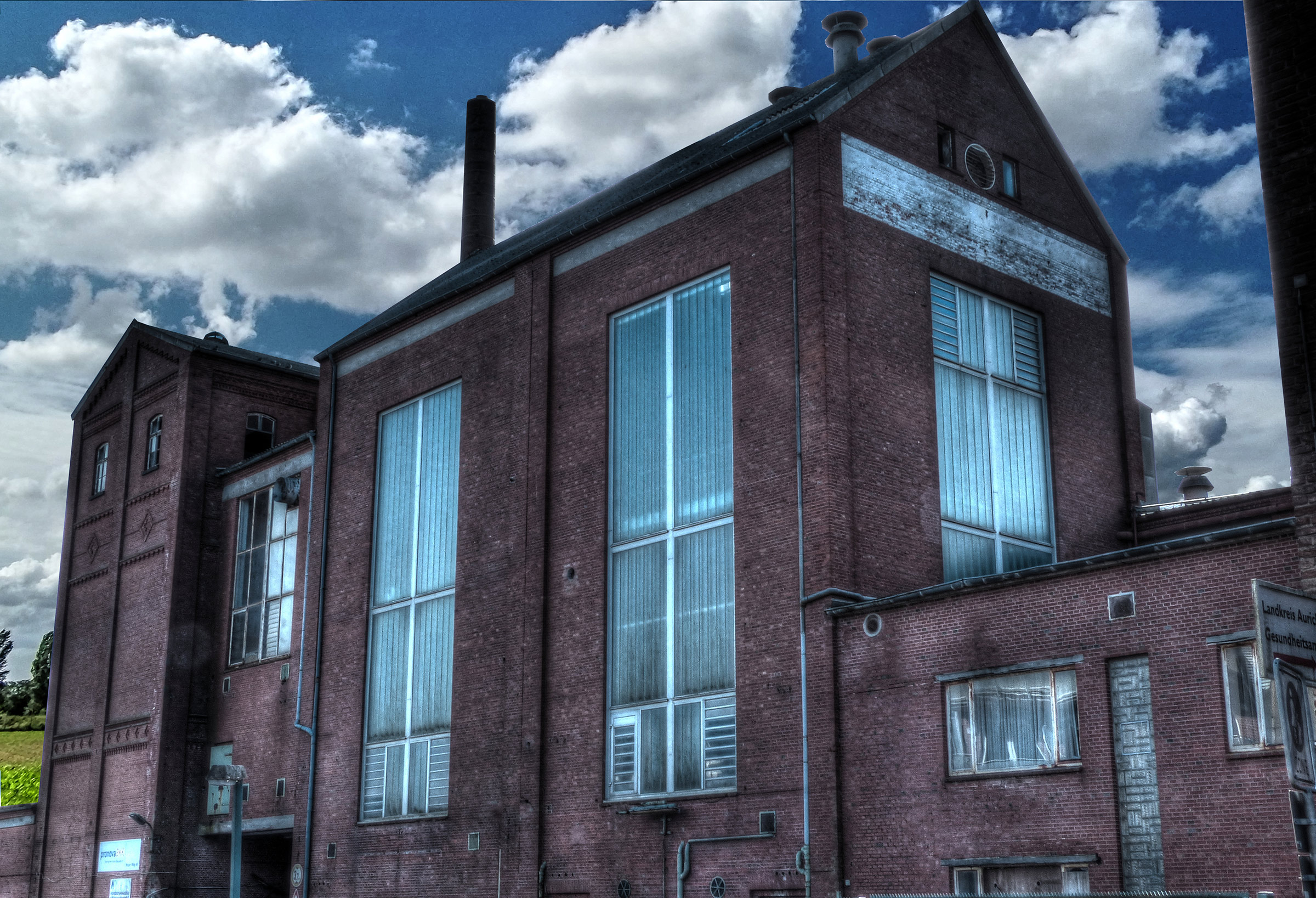 Ehemalige Doornkaat Fabrik in Norden, in der Doornkaatstraße !